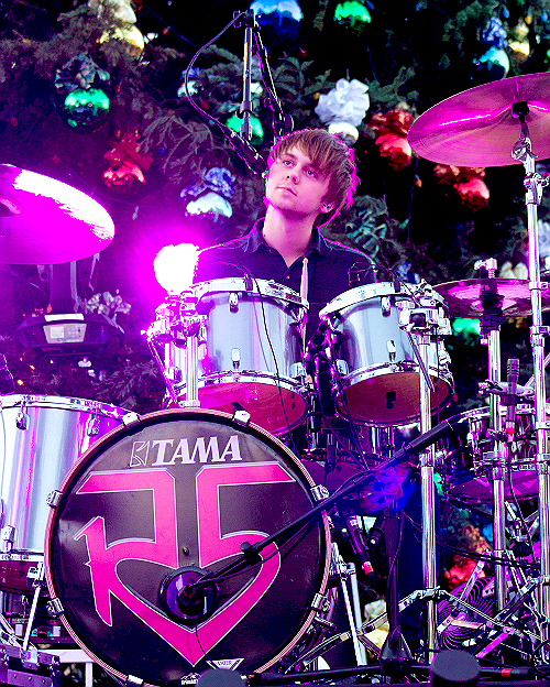 Ellington Ratliff.